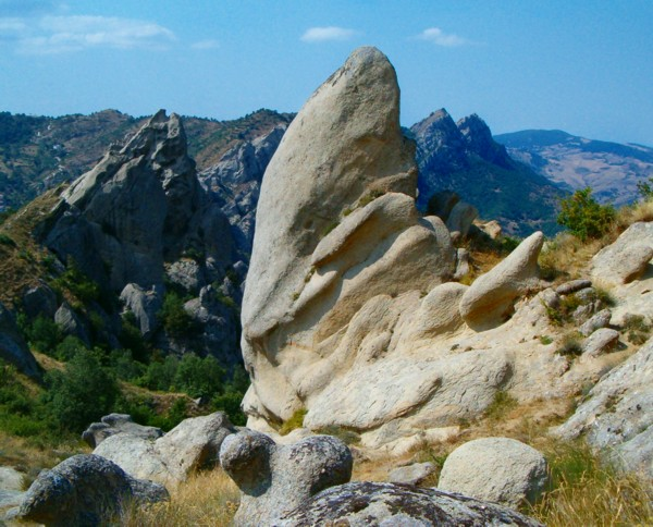 Dolomiti Lucane, Basilicata, Italy